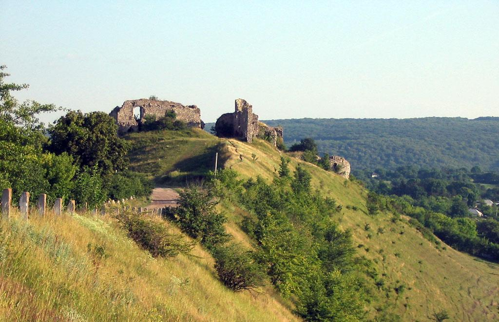 Залишки Чорнокозинецького замку, с. Чорнокозинці Кам'янець-Подільського району Хмельницької області (липень 2004)